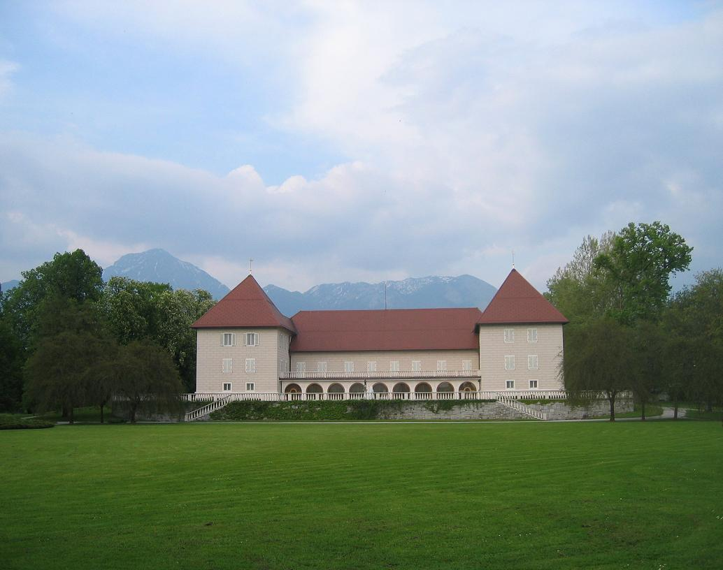 Brdo pri Kranju castle, Slovenia photo:Ziga 18:59, 13 May 2006 (UTC)